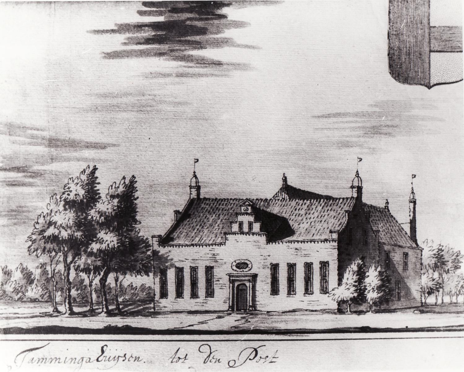 Borg Tammingahuizen bij Ten Post